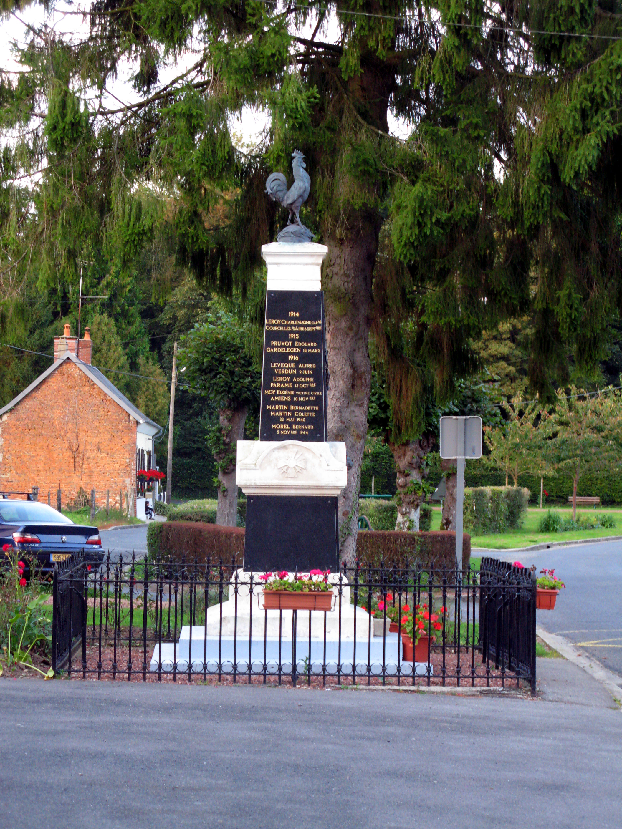 Ribeaucourt (Somme, France) - Le Monument aux Morts, vu depuis la mairie.